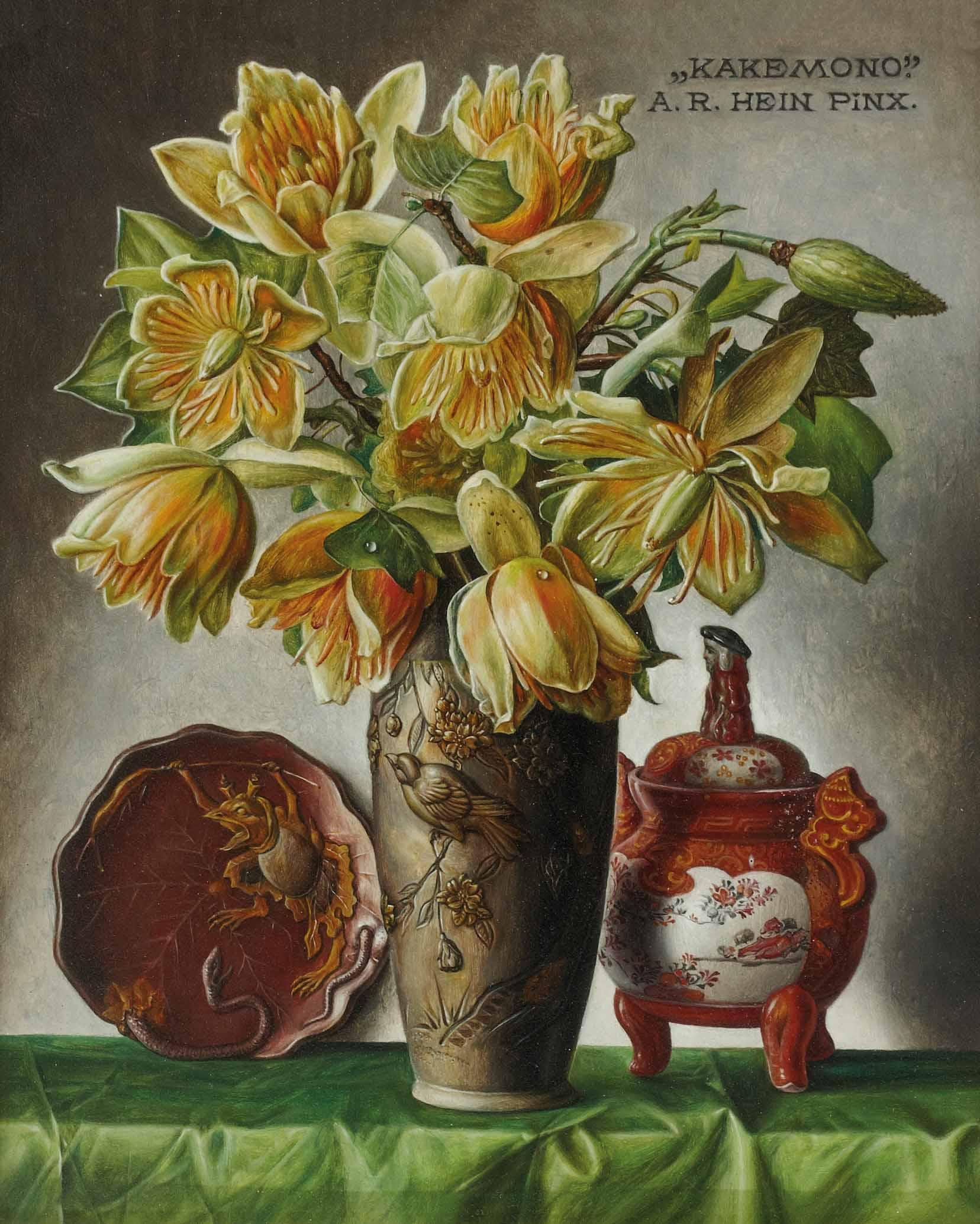 Blumenstrauß in Vase und asiatischer Dekor